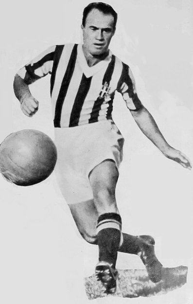 Il calciatore italiano Giovanni Ferrari in azione alla Juventus nei primi anni 30 del XX secolo.